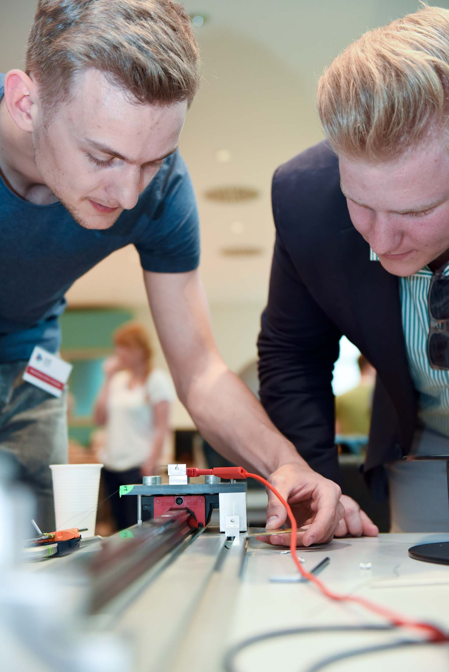 Makerspace der SLUB Dresden